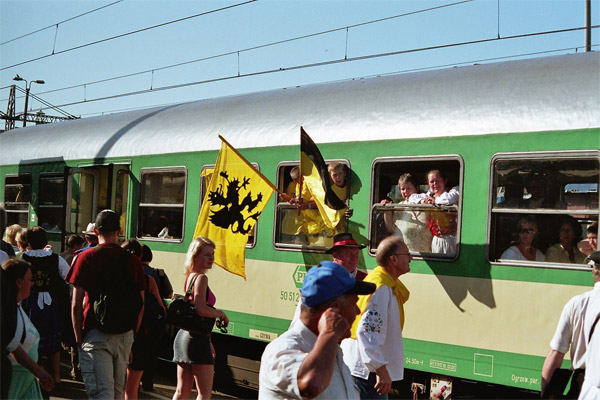 Zjazd Kaszubów 2005. Pociąg Transcassubia w drodze do Łeby. Postój na stacji Gdynia Główna Osobowa.